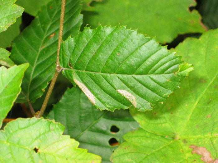 Mine von Phyllonorycter tenerella